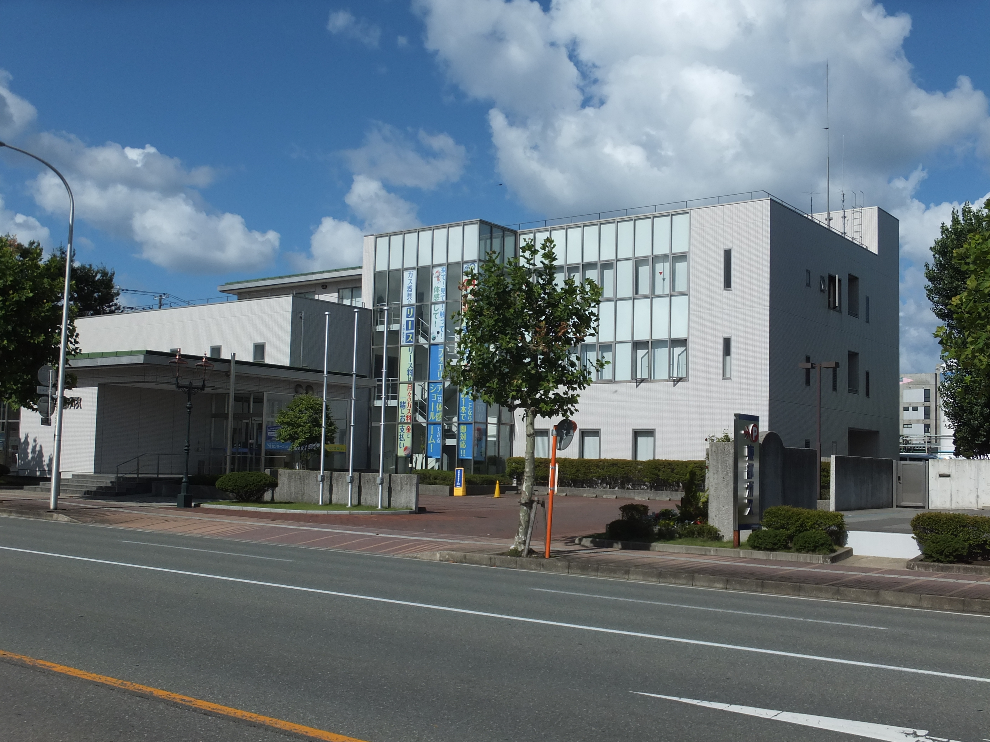 東部ガス秋田支店（秋田市楢山）